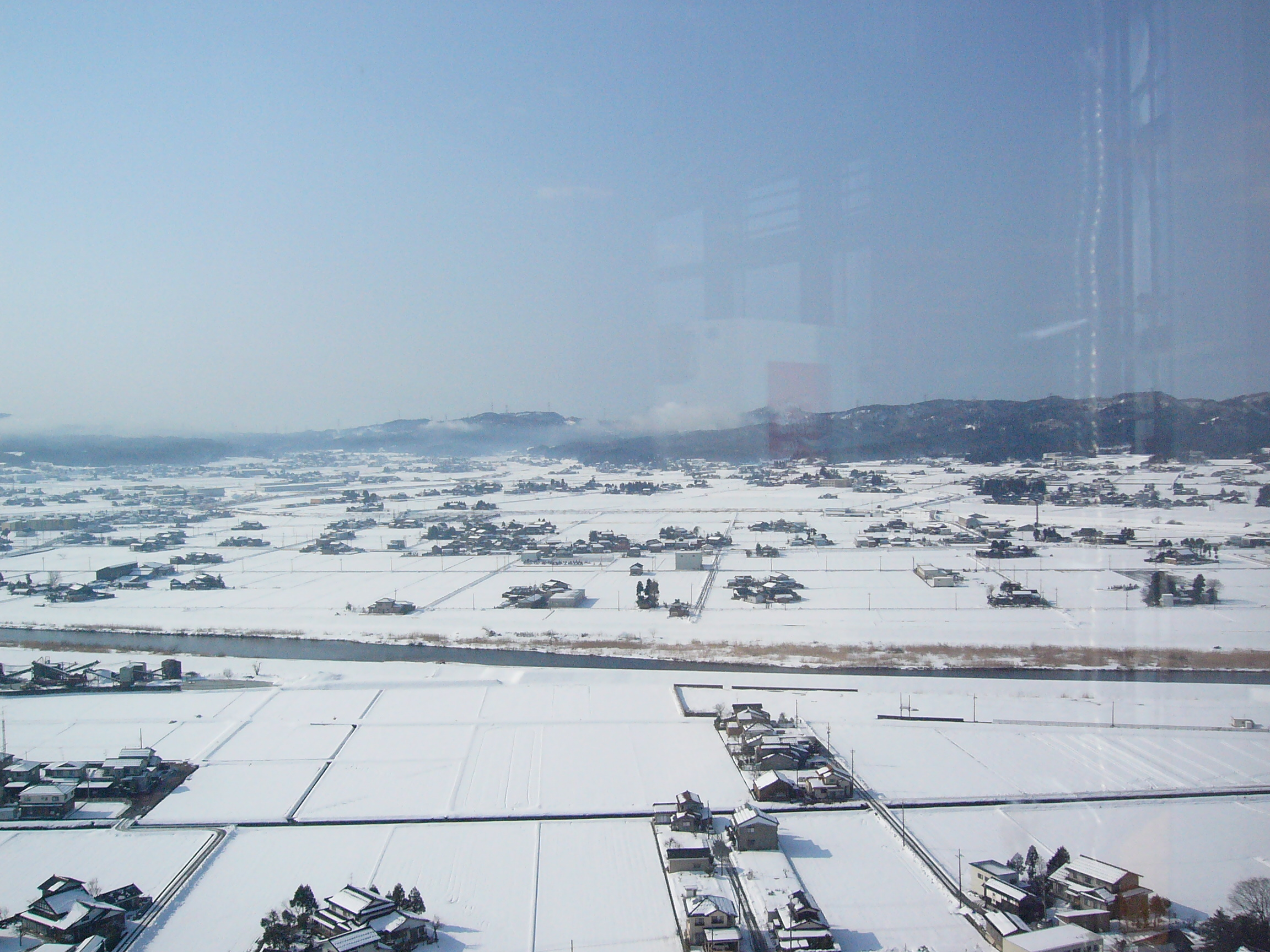 富山県小矢部市のクロスランドおやべのクロスランドタワーからの眺望。冬には銀世界の散居村が堪能できる。